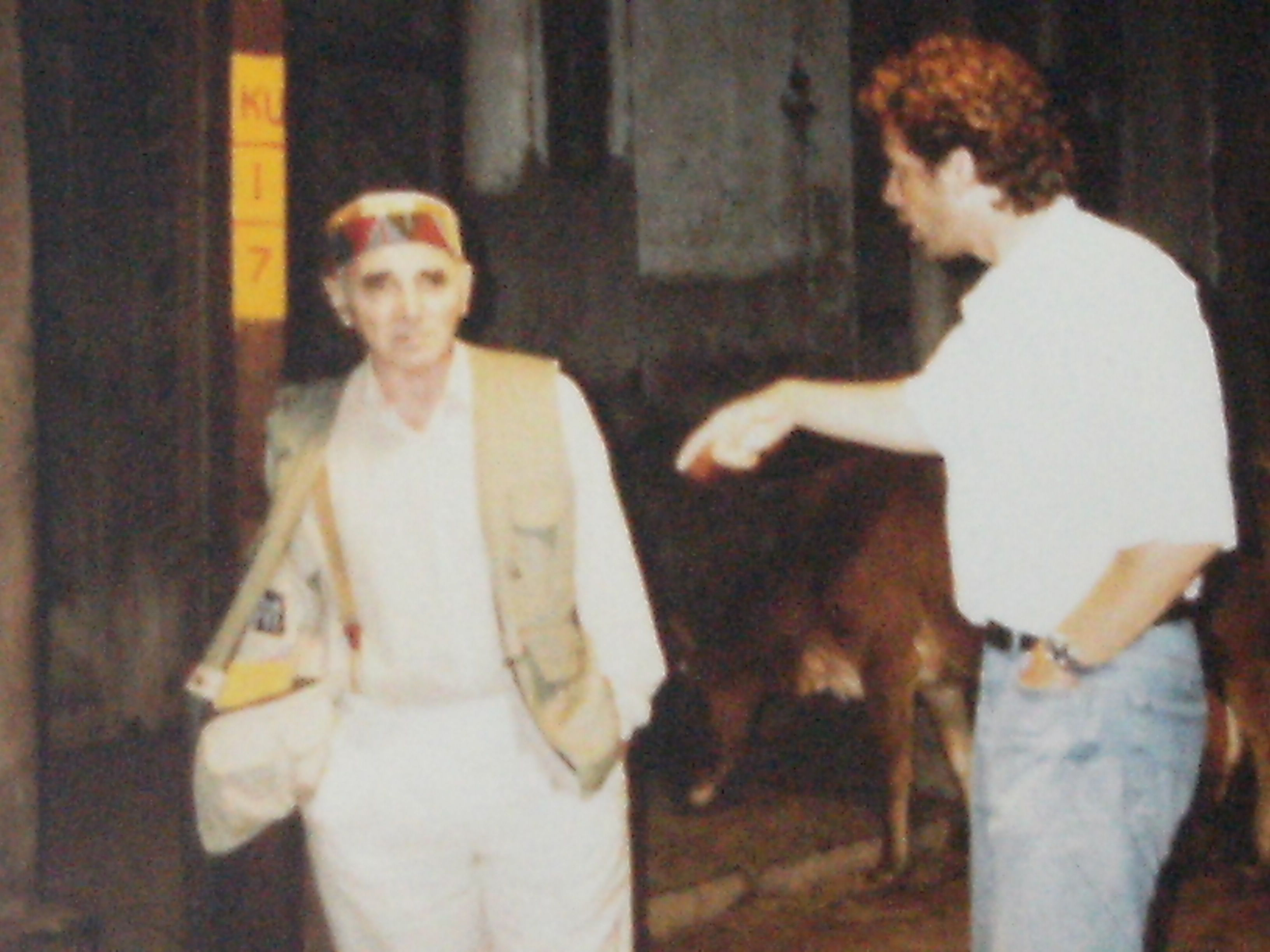 Charles Dubois indiquant un emplacement à Charles Aznavour pour le film "Rendez -vous au comptoir"